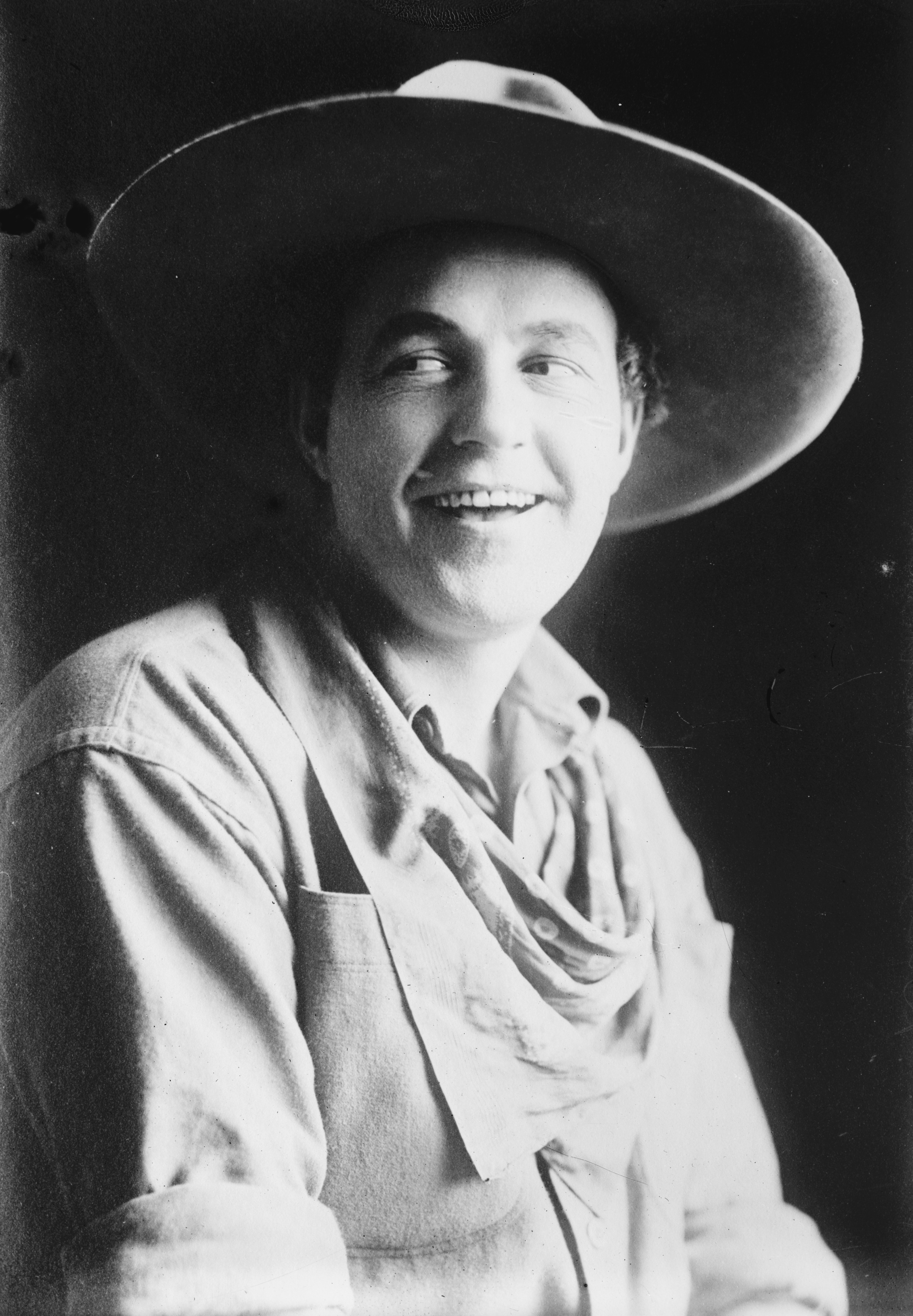 Actor Dustin Farnum